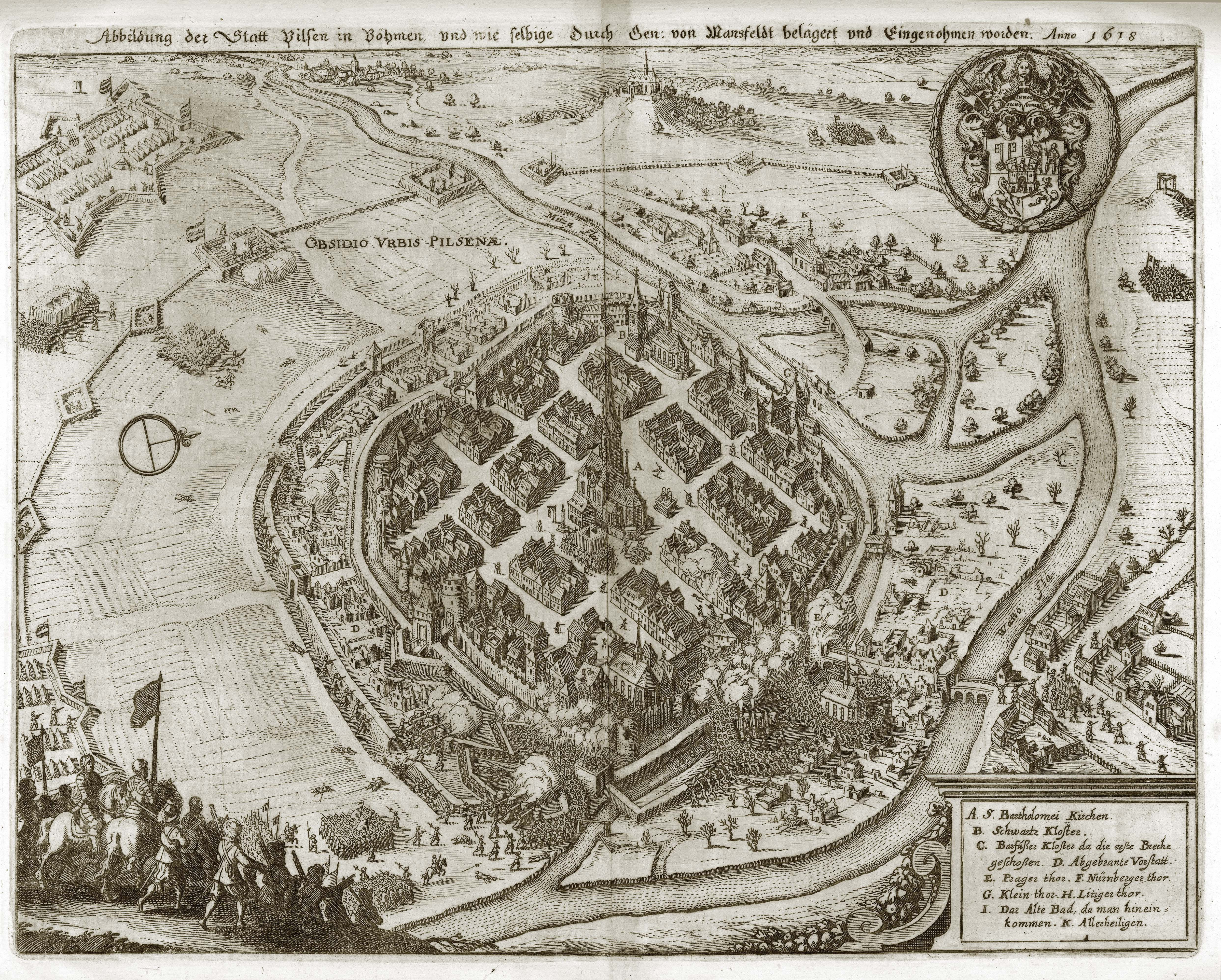 Mědirytina zobrazující obléhání Plzně z Theatrum Europaeum